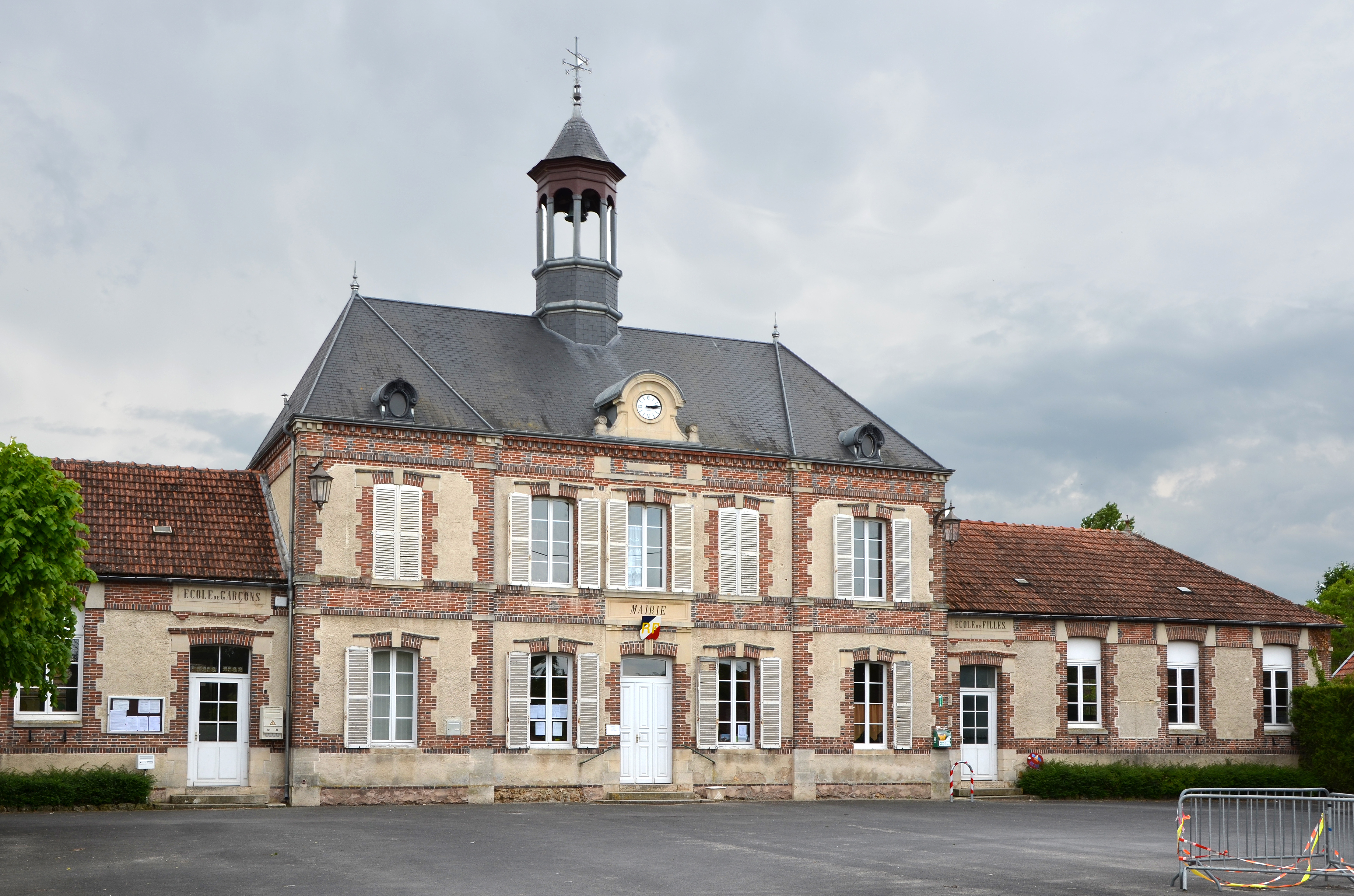 Mairie de Clesles, Marne, France